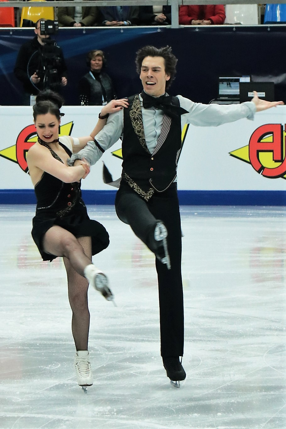 Люция Мысливечкова / Лукаш Цолли (Словакия) на Чемпионате Европы по фигурному катанию 2018.